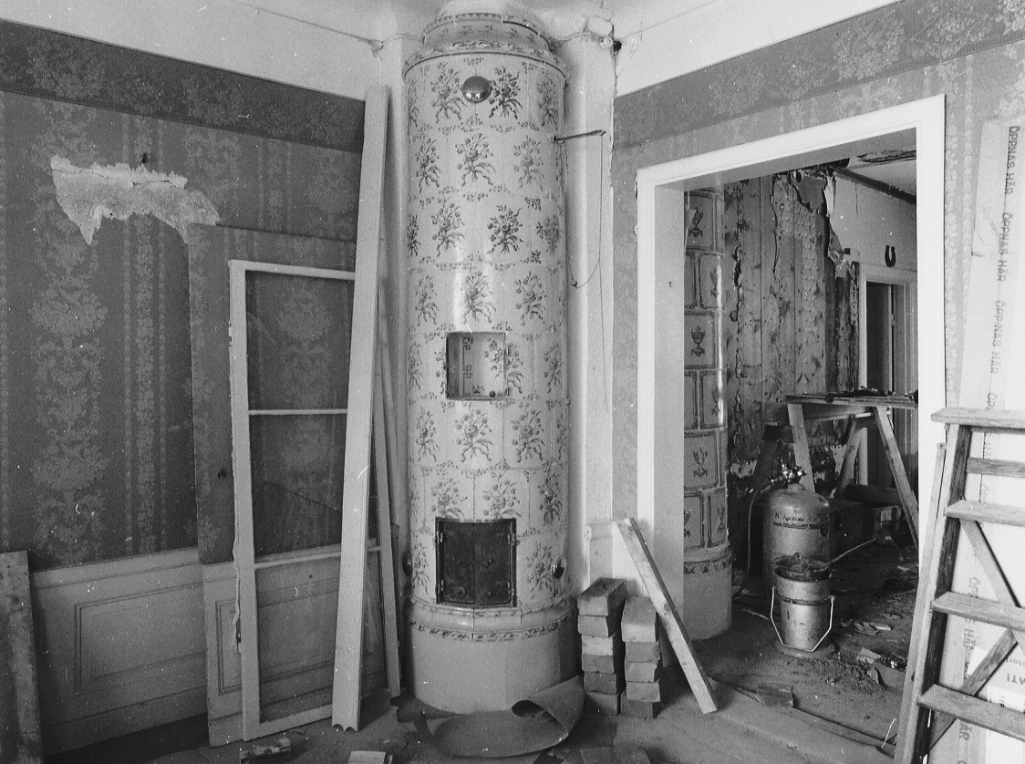 Skönstavik under renovering